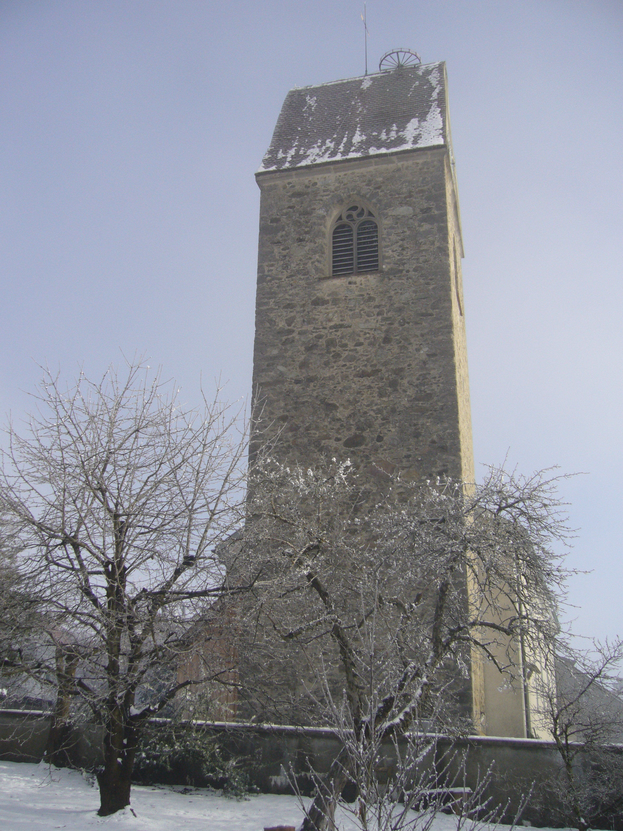 Kirchturm von Lustorf.